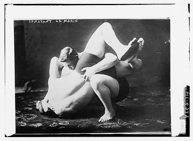 Plaque photographique de Constant le Marin luttant, vers 1910-1915, Bibliothèque du Congrès. Reproduction Number: LC-DIG-ggbain-12651 (digital file from original negative)